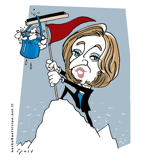 Cartoon